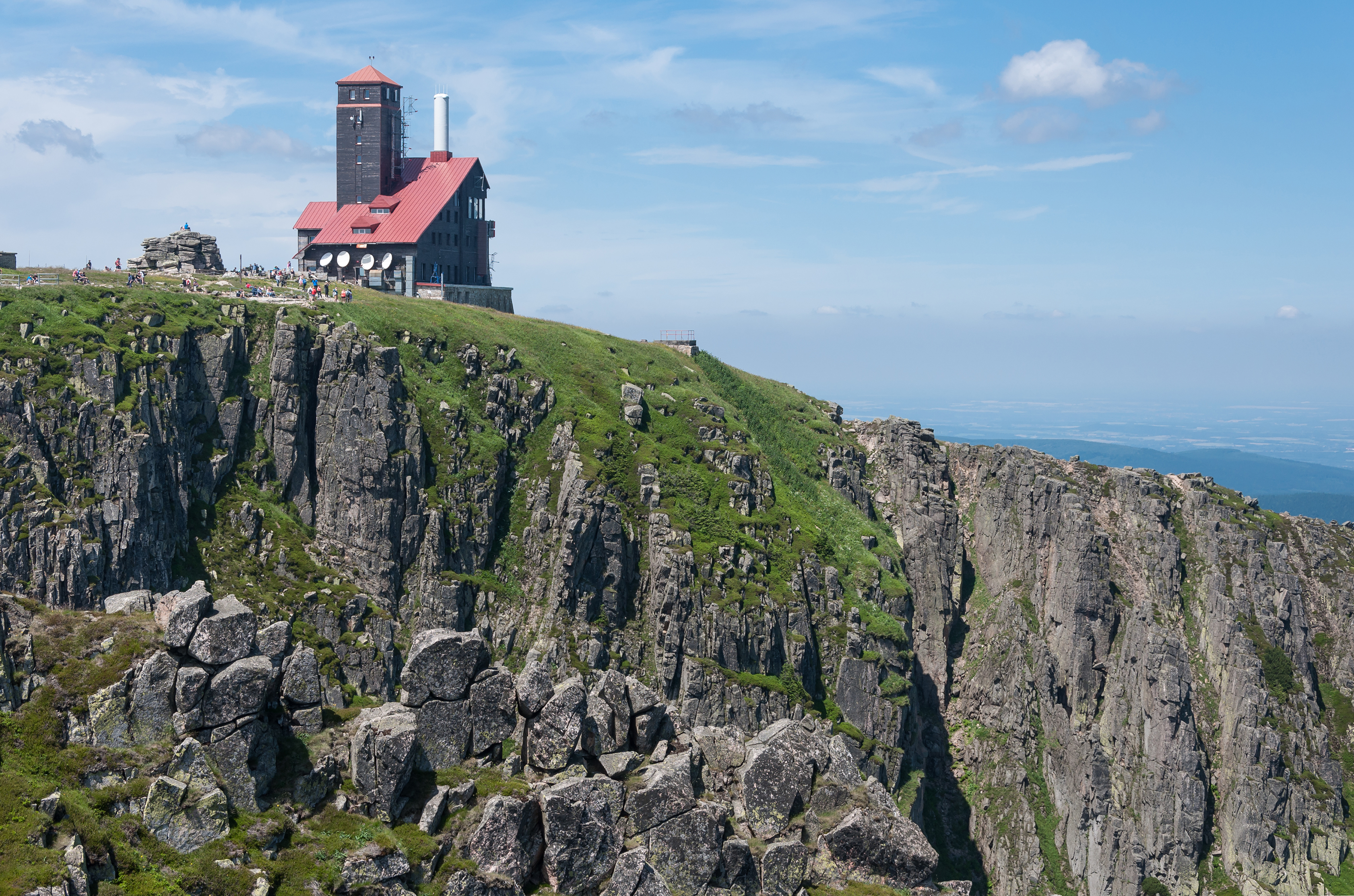 Park narodowy: Karkonoski Park Narodowy. Ośrodek nadawczy w Śnieżnych Kotłach This is a photography of protected area with CRFOP ID PL.ZIPOP.1393.PN.11